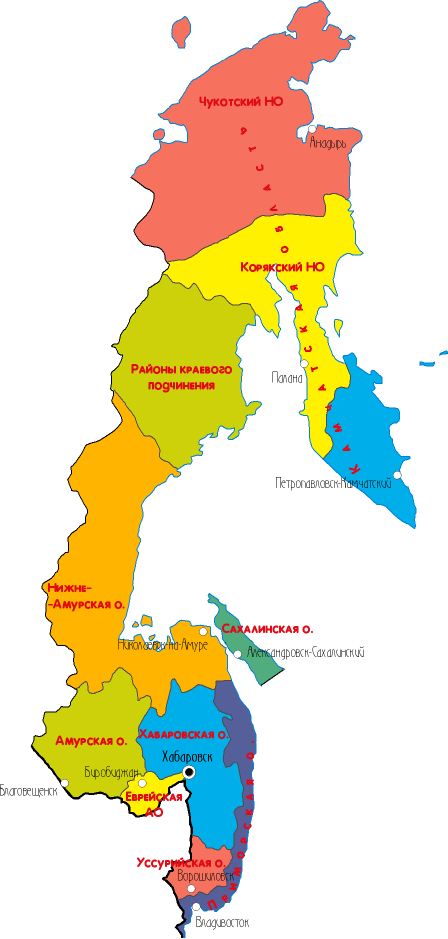 Карта Дальне-Восточного края в 1938 году